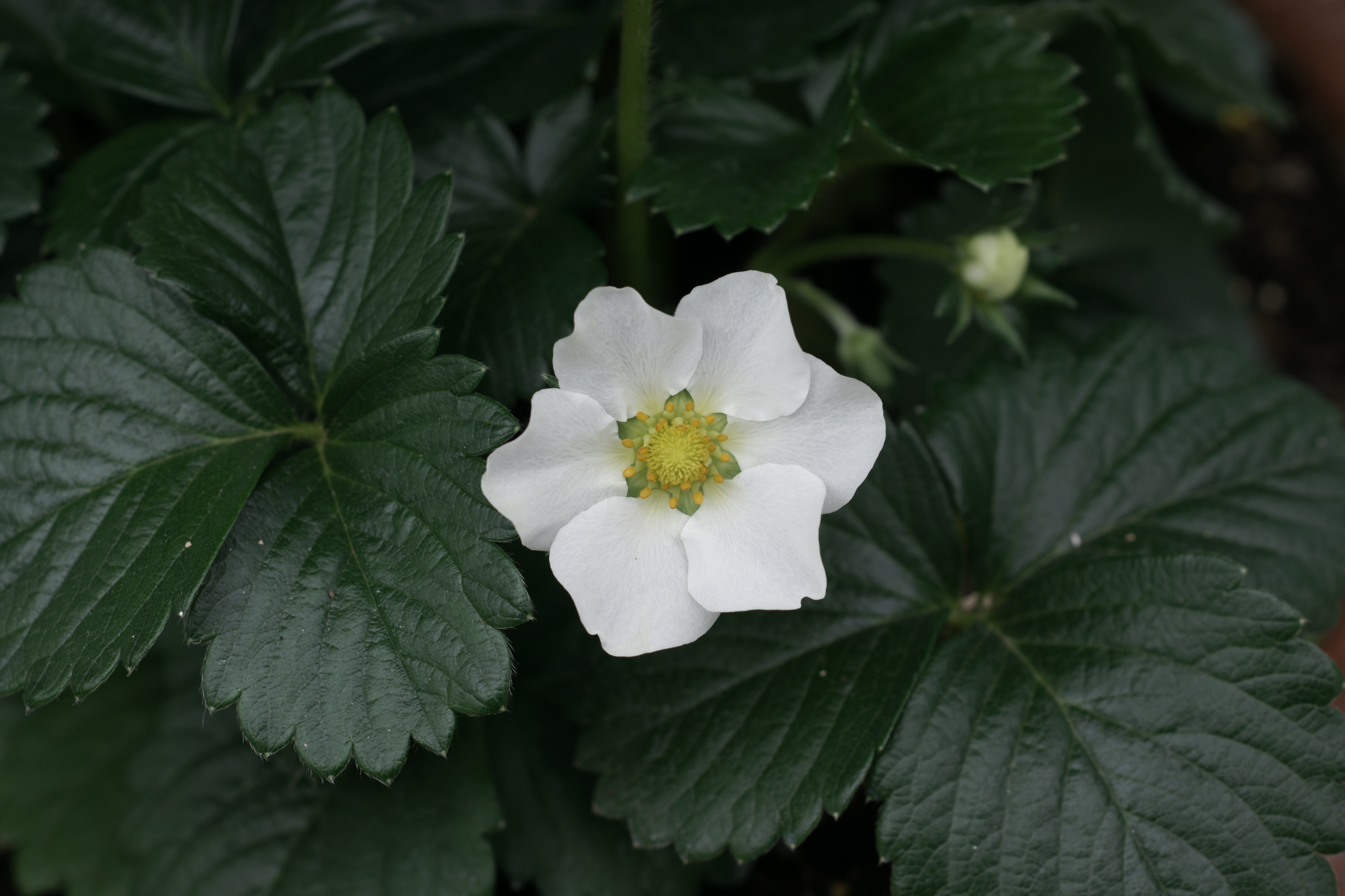 Fragaria